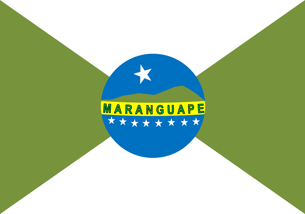 Bandeira do município de Maranguape estado do Ceará, Brasil.